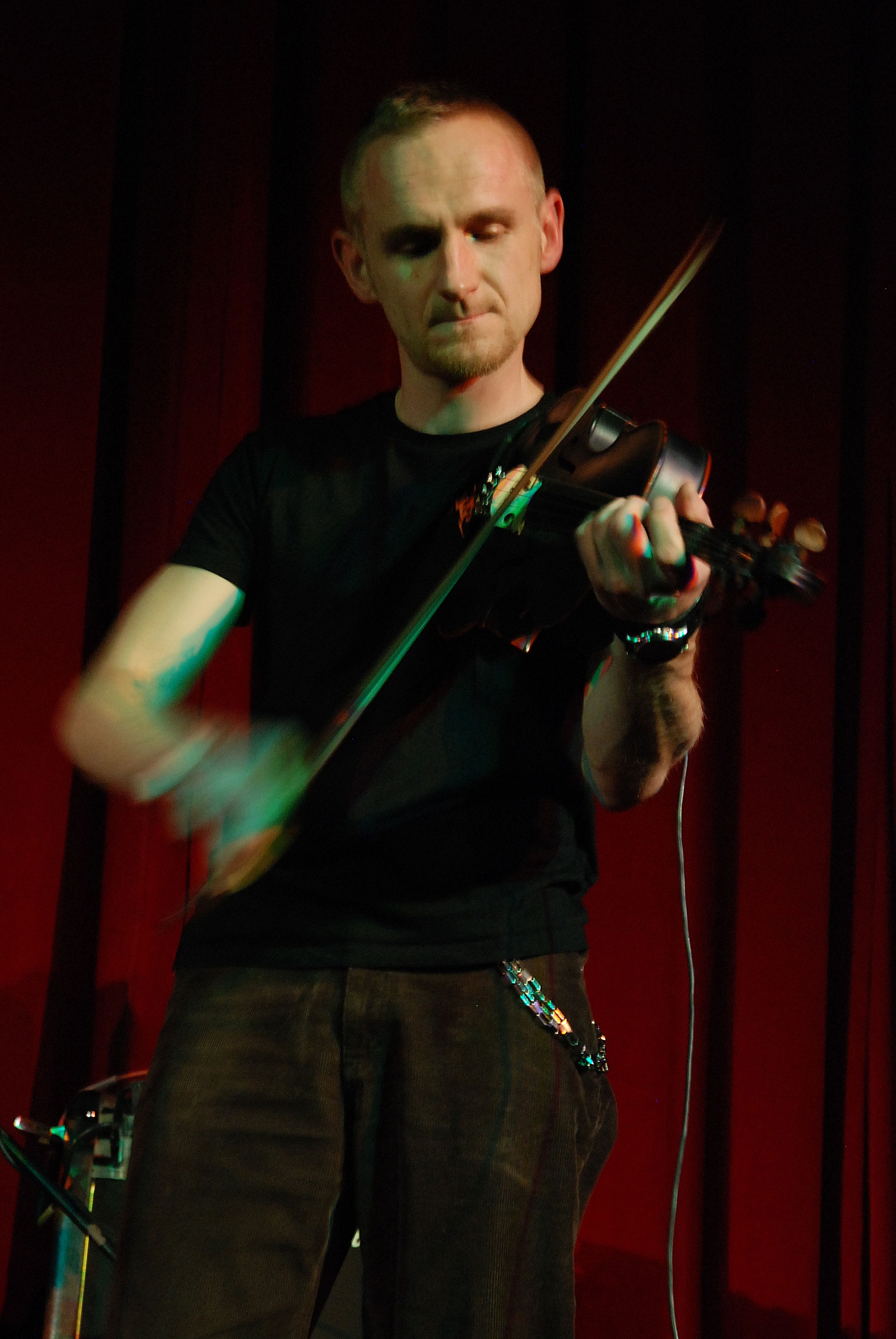 Żywiołak podczas Festivalu Ars Cameralis 2009 "Wieczór Muzyki Folkowej" w Kinoteatr "Rialto" w Katowicach 24.11.2009